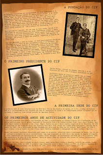 História do CIF